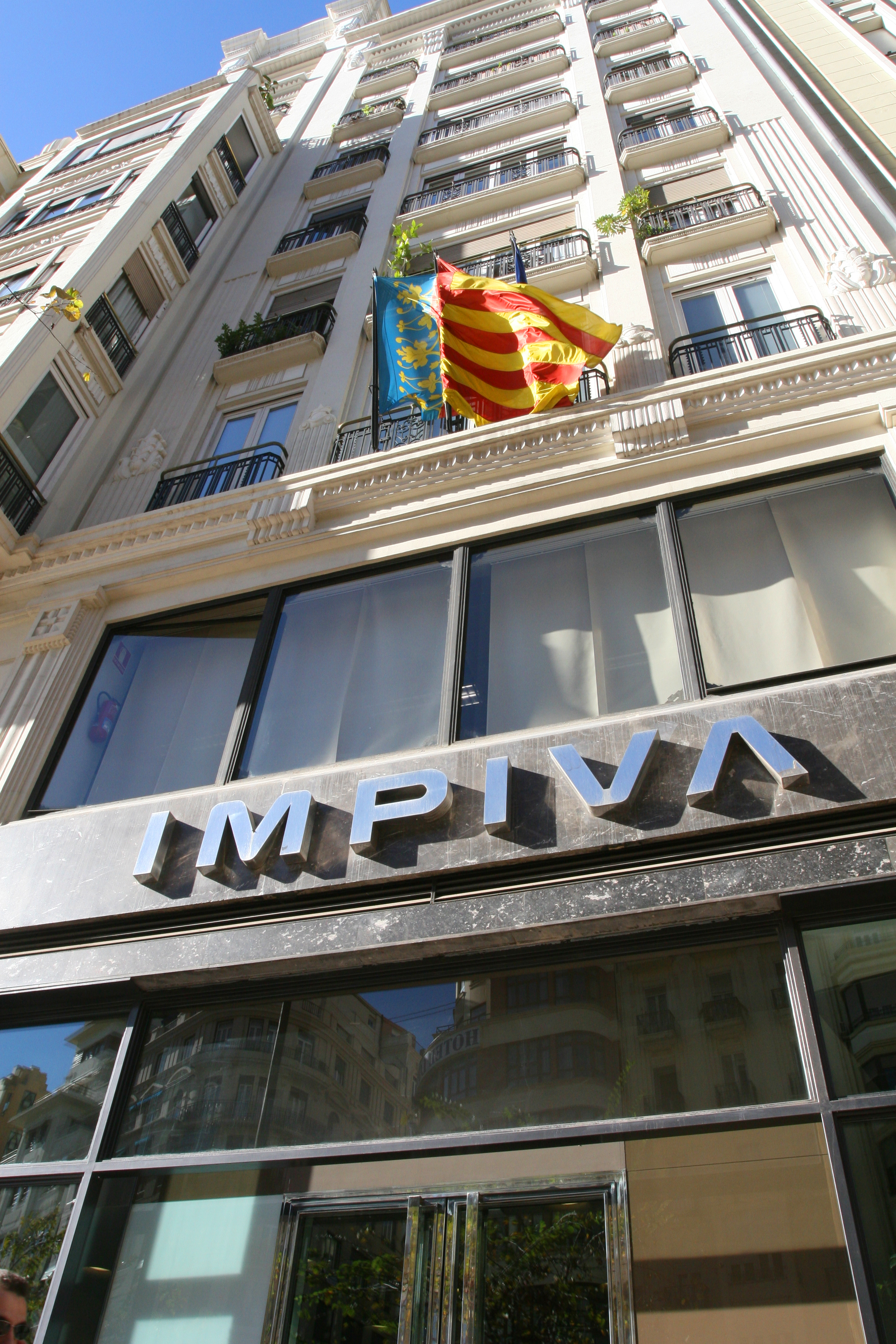 foto impiva